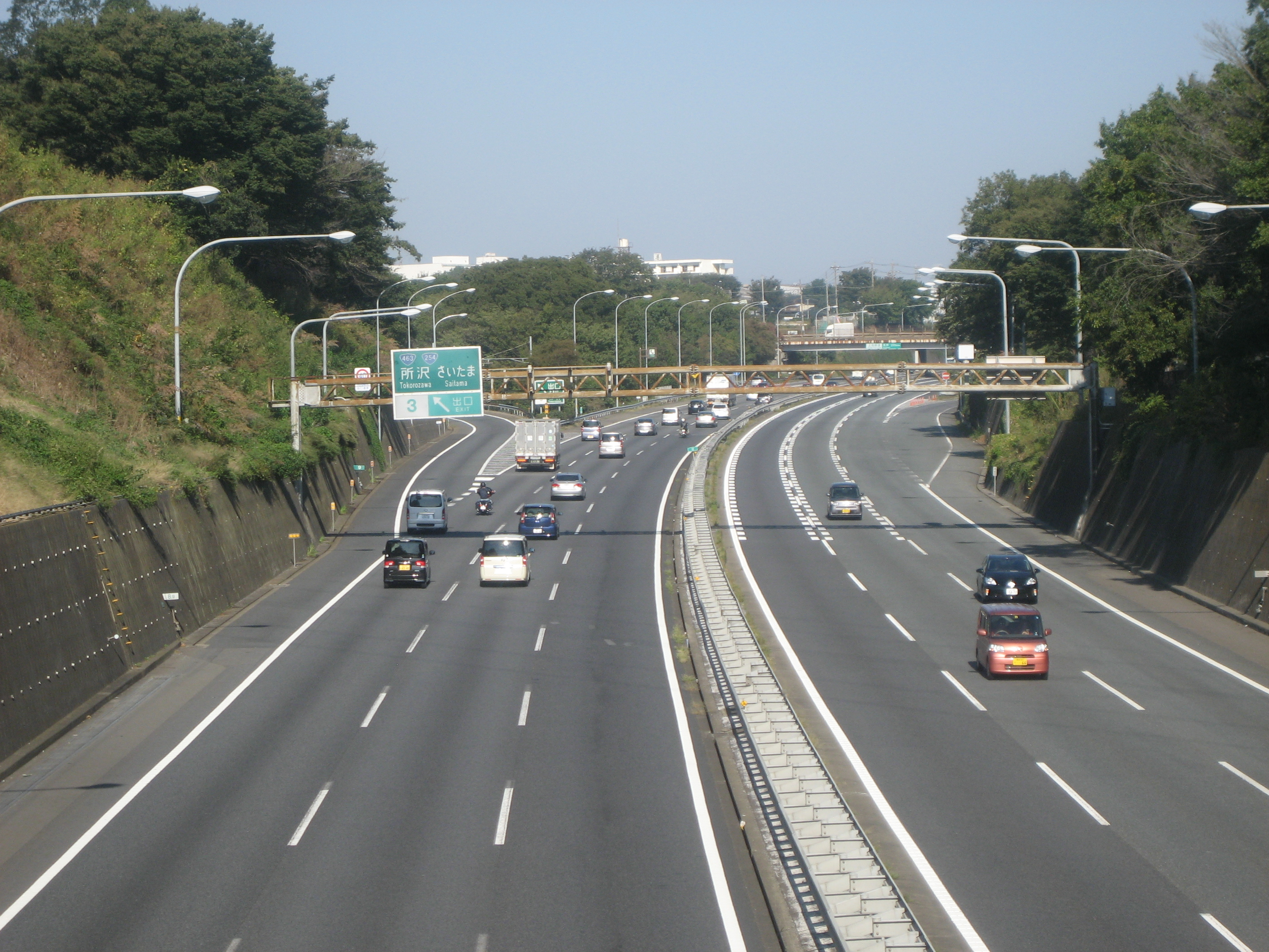 関越自動車道所沢インターチェンジ上り合流及び下り分流部付近（一般道跨道橋上から撮影）